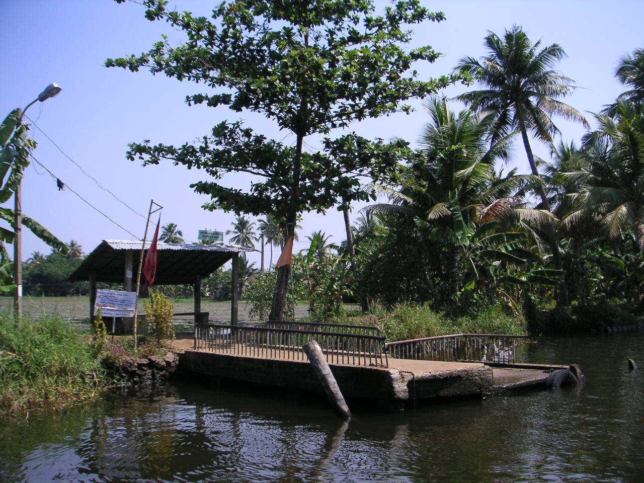 Kerala Backwaters.